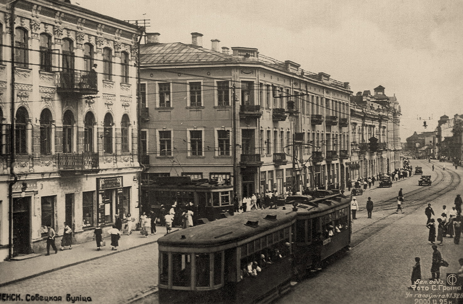 Рог вуліц Савецкай і Валадарскага, 1930-я. Злева Дом Воліна і Дом Маліна